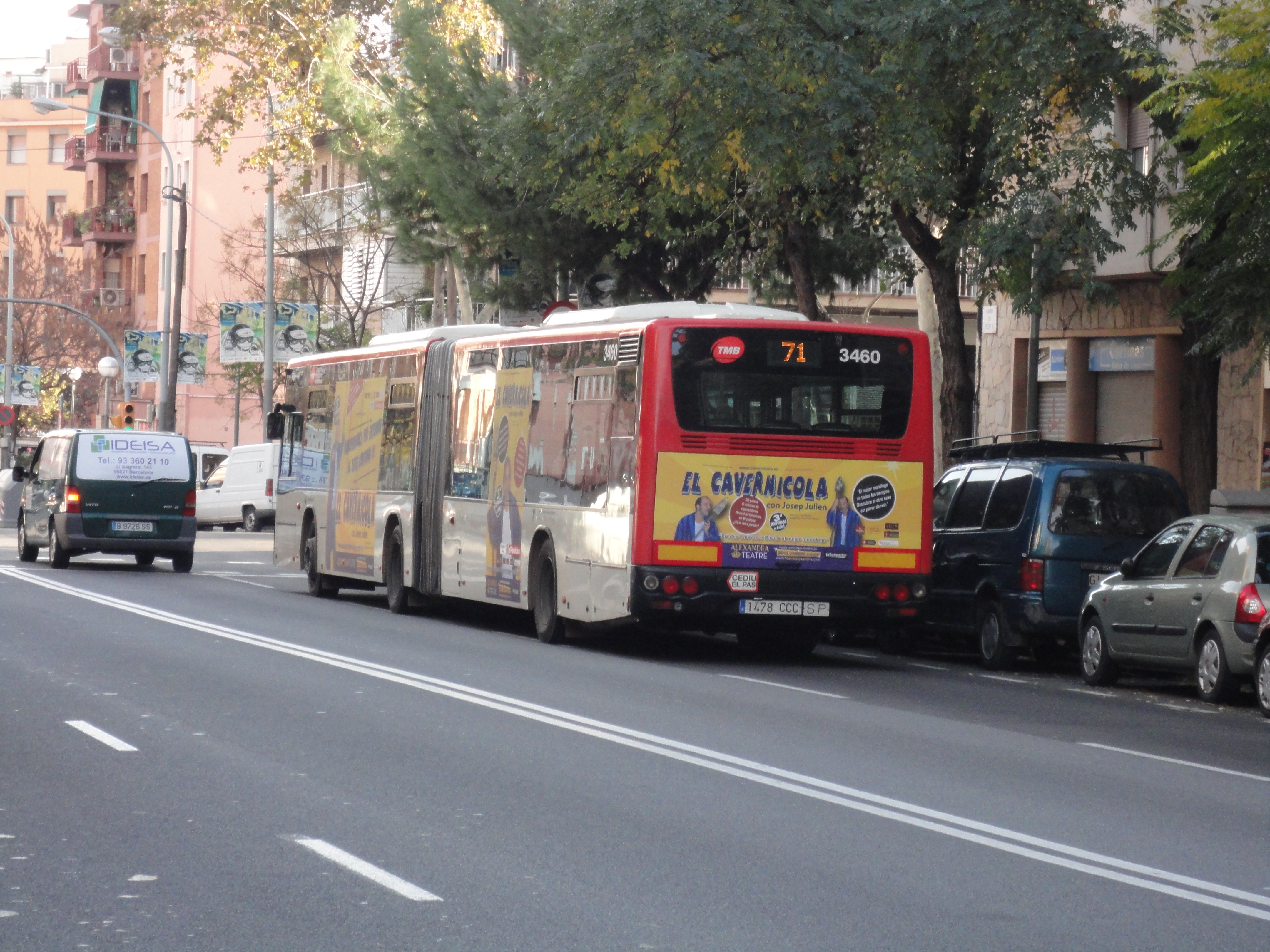 Autobús de la línia 71 a Felip II.